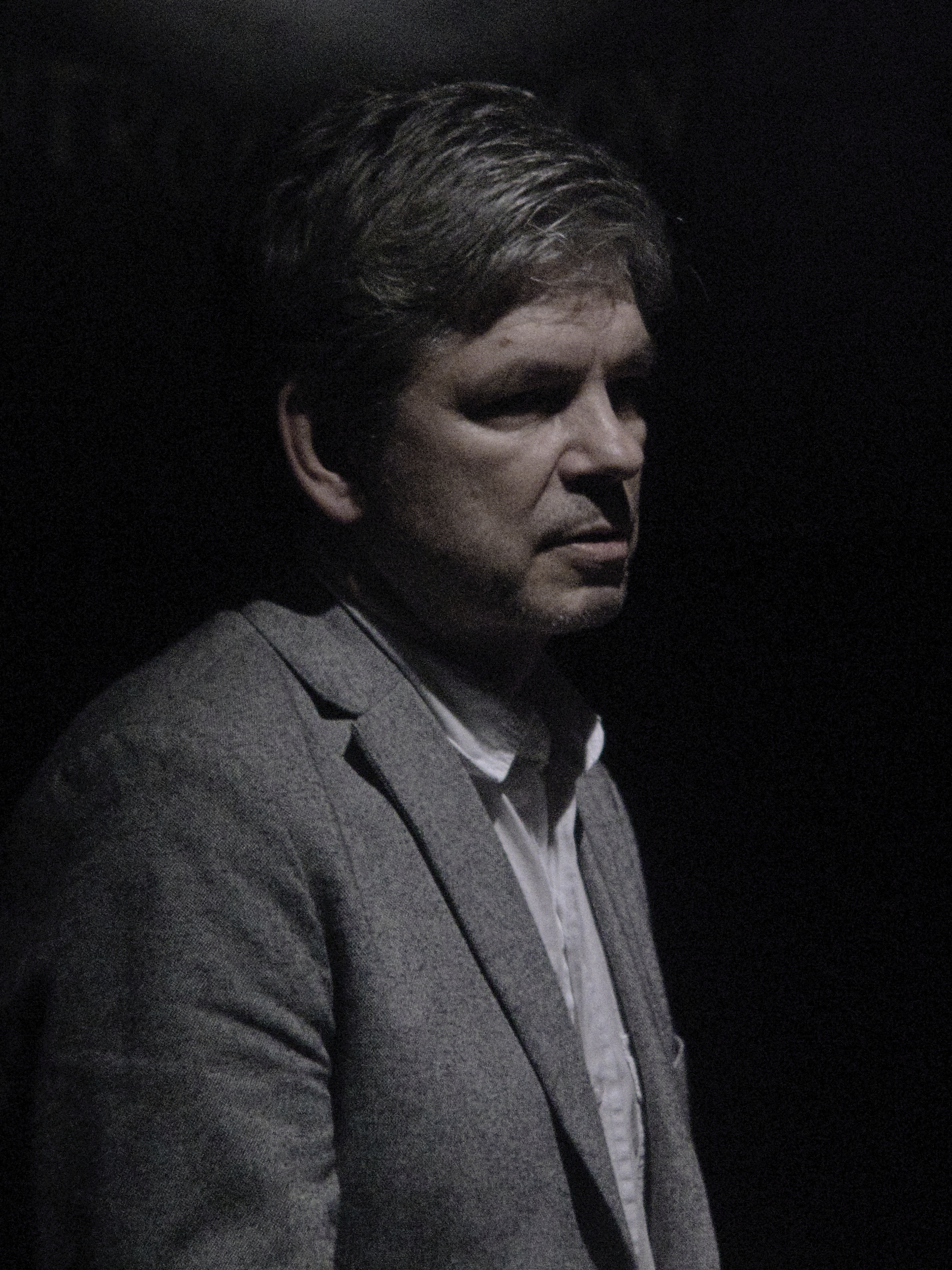 Filip Łobodziński na otwartym wydarzeniu Re-Interpretacje, które towarzyszyło Ogólnopolskiemu Festiwalowi Sztuki Reżyserskiej Interpretacje z okazji 50. rocznicy pierwszego polskiego wydania „Ulissesa” Jamesa Joyce’a (Państwowy Instytut Wydawniczy, 1969) oraz najnowszego tłumaczenia tejże powieści autorstwa Macieja Świerkockiego; spotkanie odbyło się na Scenie Kameralnej Teatru Śląskiego w Katowicach; zdjęcie wykonane za zgodą Ogólnopolskiego Festiwalu Sztuki Reżyserskiej Interpretacje i Katowic Miasta Ogrodów